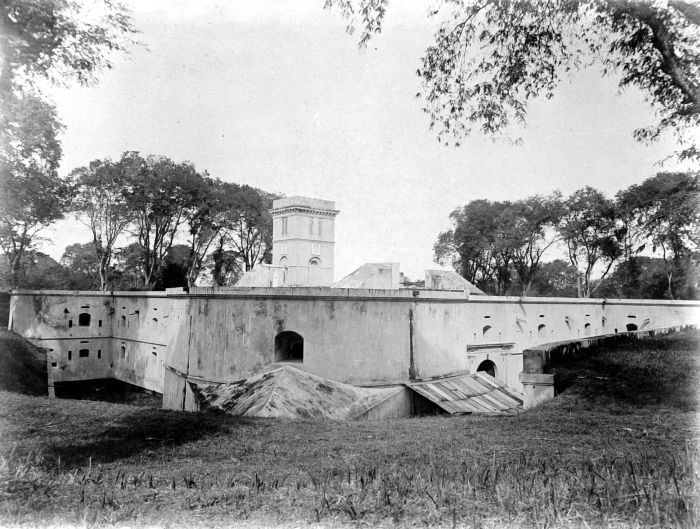 Repronegatief. Citadel "Prins Hendrik" te Weltevreden